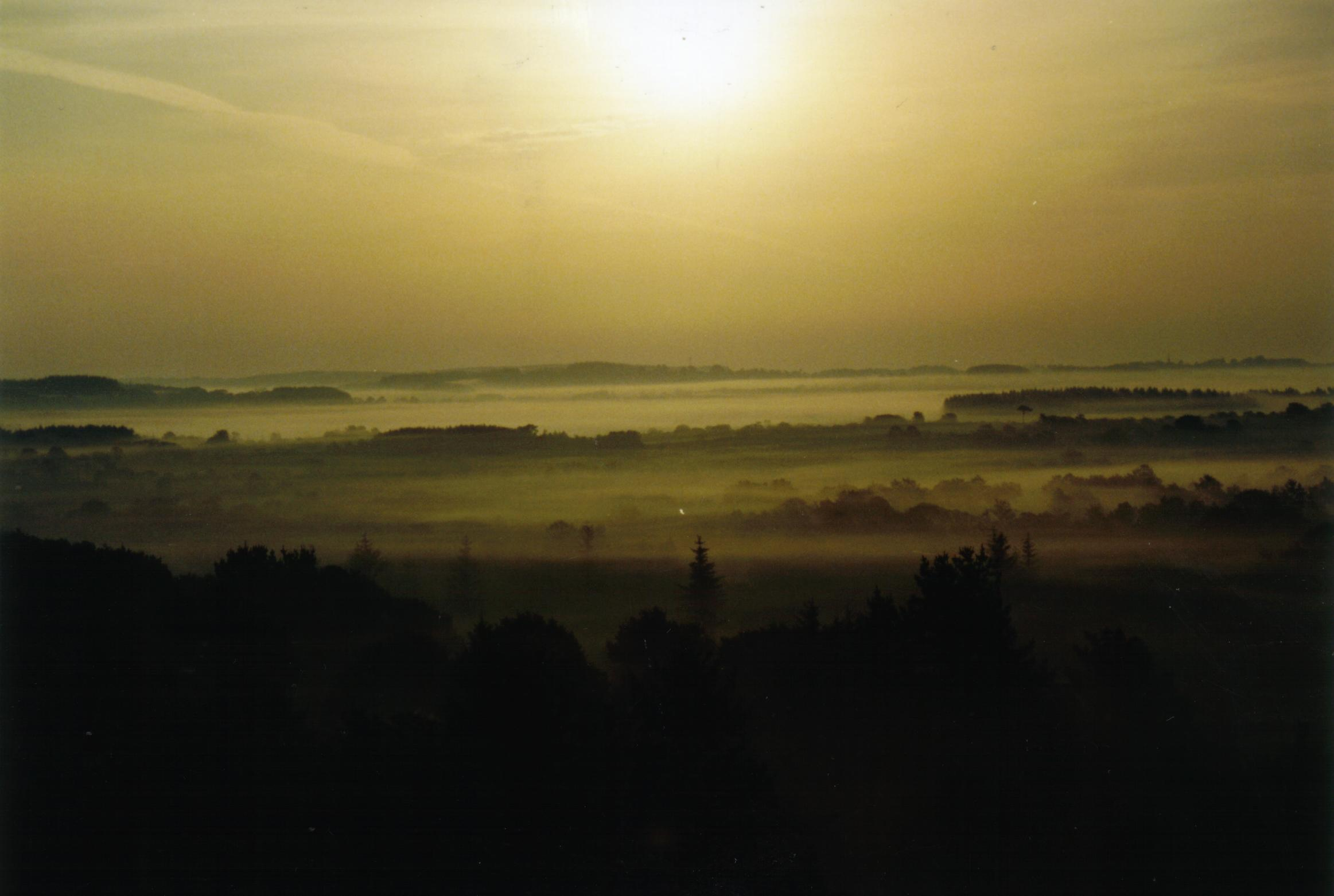 Brumes sur le marais du Yeun Elez au lever du soleil vues depuis une maison située sur une hauteur à Botmeur